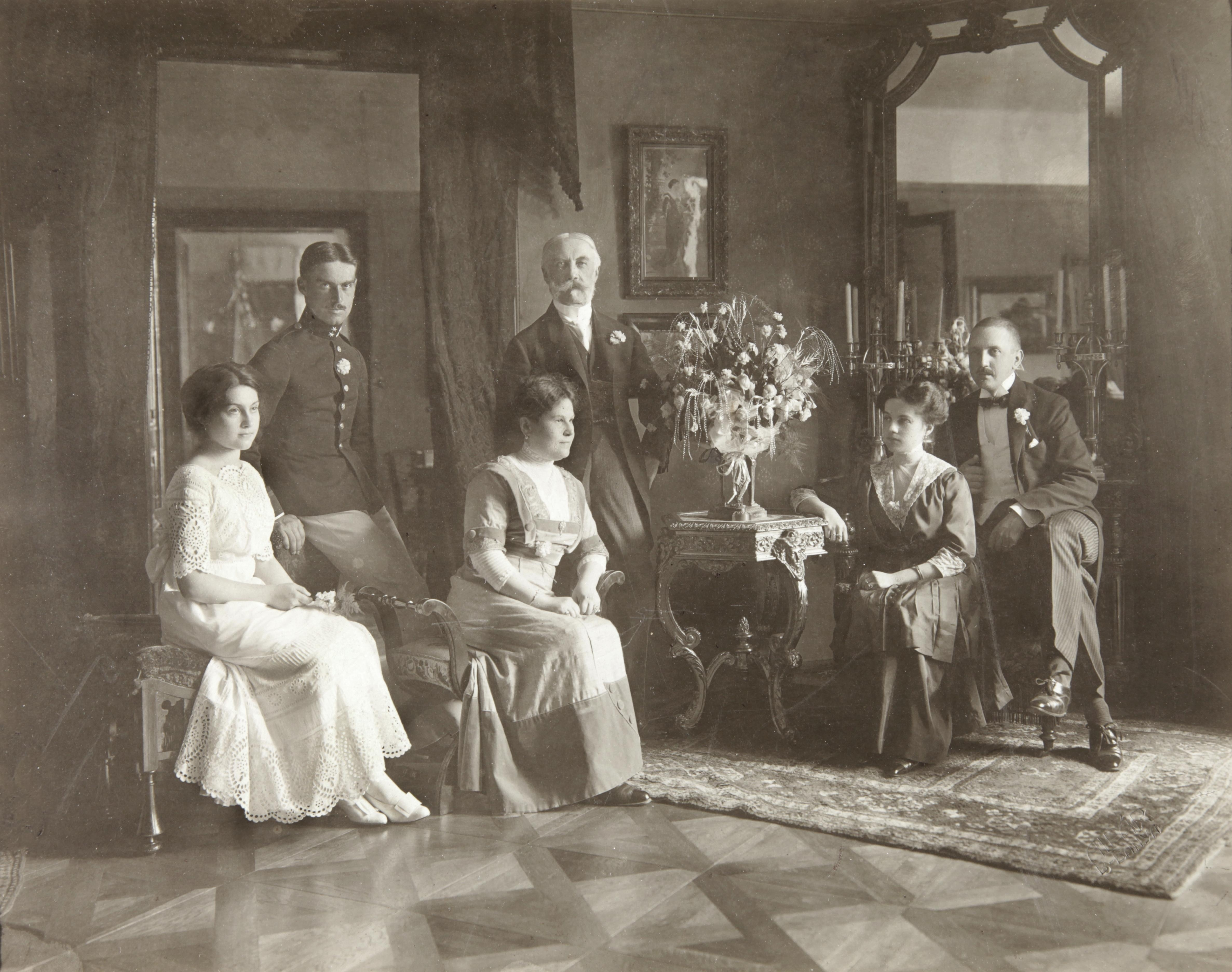 a Jeszenkszky-család tagjai és jobbra Neÿ Ákos a Duna-Száva-Adria Vasút későbbi igazgatója. Location: Slovakia, Banska Bystrica Tags: interior, bouquet Title: a Jeszenkszky-család tagjai és jobbra Neÿ Ákos a Duna-Száva-Adria Vasút későbbi igazgatója.